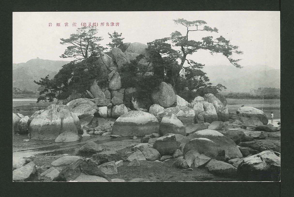 絵葉書のシリーズ『最も新しき唐津松浦潟名勝』のひとつ